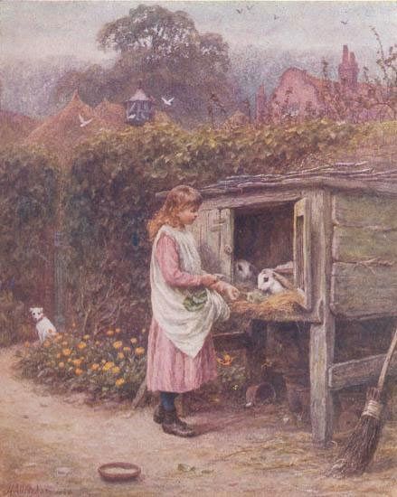 La Cage à lapins - Aquarelle Peintre anglais